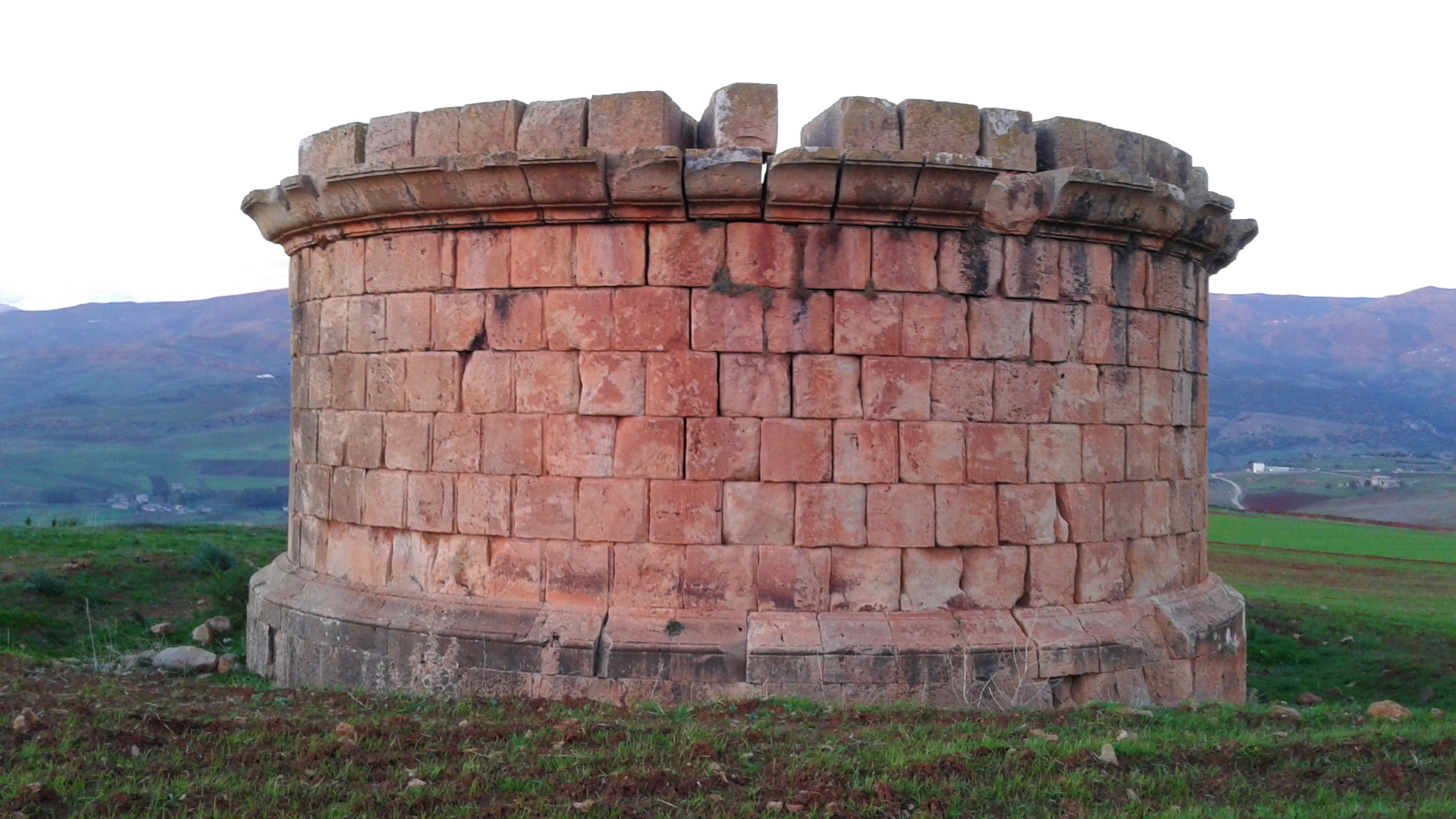 يقع ضريح لوليوس في جبل شواية بالمكان المسمى "الهري" في بلدية بني حميدان على بعد حوالي 25 كلم شمال غرب قسنطينة بالجزائر، غير بعيد عن المدينة الأثرية "تيدس" له شكل أسطواني، بني من حجارة منحوتة وشيدّ من طرف "ك" لوليوس إبريكيس " حاكم روما آنذاك تخليدا لعائلته.